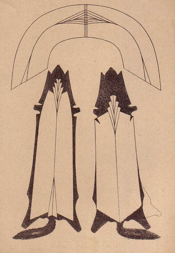 Graphics for Furriers Kragen aus 2 Marder oder Zobel (Ausschnitt)